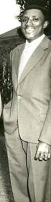 Cinq des six présidents des gouvernements provinciaux au lendemain de l’indépendance. De g à d: Barthélémy Mukenge (Kasaï), Jean Mihuro (Kivu), Cléophas Kamitatu (Léopoldville), Jean-Pierre Finant (Province Orientale) et Laurent Eketebi (Equateur). Absent sur la photo : Moïse Tshombe, président du gouvernement provincial du Katanga.